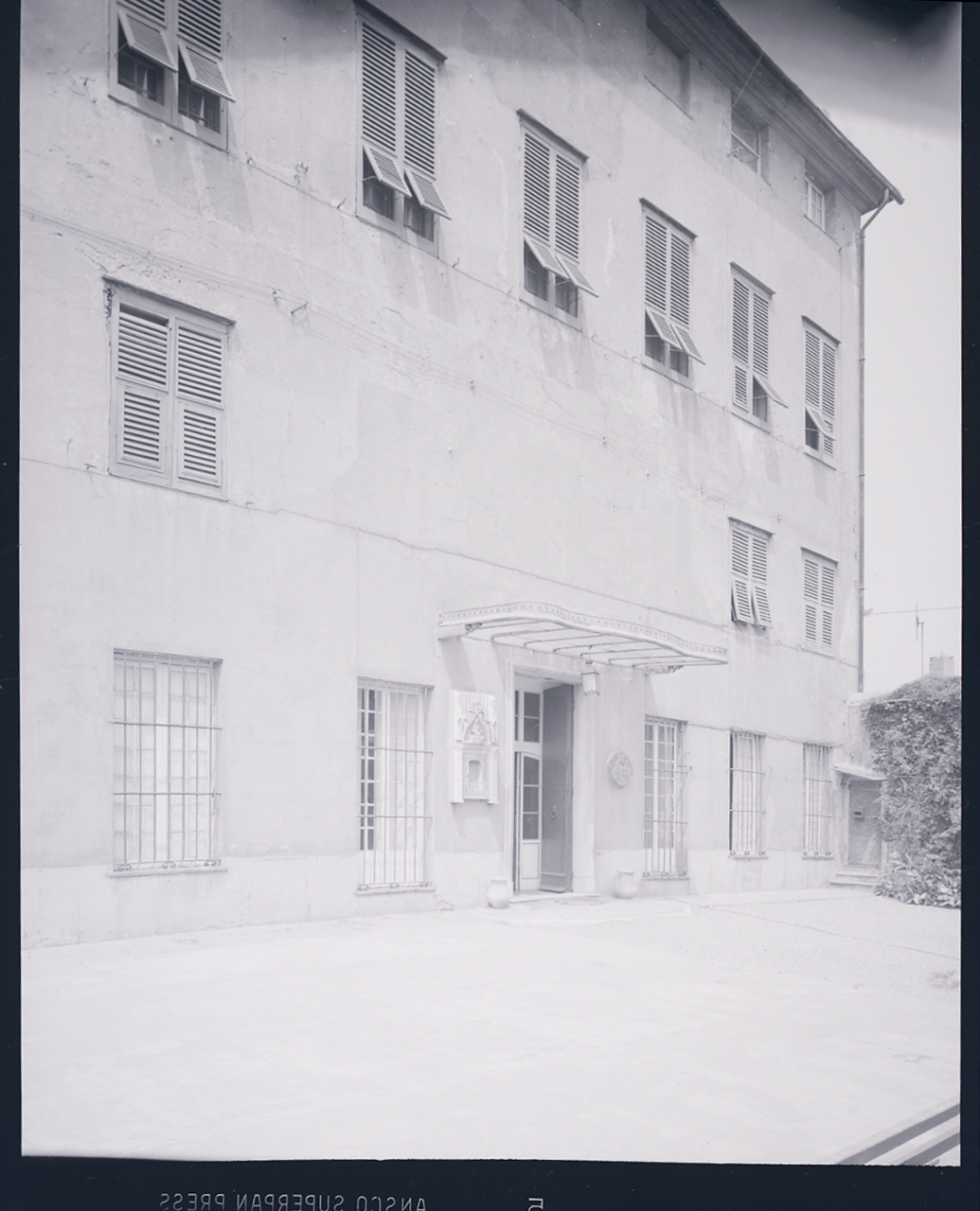 Servizio fotografico : Genova, 1963 / Paolo Monti. - Buste: 9, Fototipi: 9 : Negativo b/n, gelatina bromuro d'argento/ pellicola ; 10x12. - ((Serie costituita da 9 buste sciolte di negativi identificati con i nn.: 7085, 7086, 7087, 7088, 7089, 7090, 7091, 7092, 7093. - Il negativo identificato con il numero 46397 è stato realizzato per Zodiac. - Occasione: Documentazione per la pubblicazione: Italia Nostra (a cura di), "Le ville genovesi", catalogo della mostra, Genova 1962, Genova, Comune di Genova, 1967. - Fonte: Monografia di Italia Nostra (a cura di): Le ville genovesi, catalogo della mostra, Genova 1962, Genova, Comune di Genova (1967). - Fonte: Lettera di Paolo Monti: I. Carteggi/ Genova - Enrico (1963-1966), presso Archivio Paolo Monti. Camicia con documenti dattiloscritti e manoscritti vari relativi al lavoro eseguito per Italia Nostra: preventivi, lettere, inventari. - Fonte: Rubrica di Paolo Monti: Archivio fino 1-4-1961/ 31-3-1963 (1961-1963), presso Archivio Paolo Monti. - Fonte: Agenda di Paolo Monti: R 1 - Monti/ 1 aprile 1963 - 6 giugno 1964/ 6000-8193 (1963-1964), presso Archivio Paolo Monti